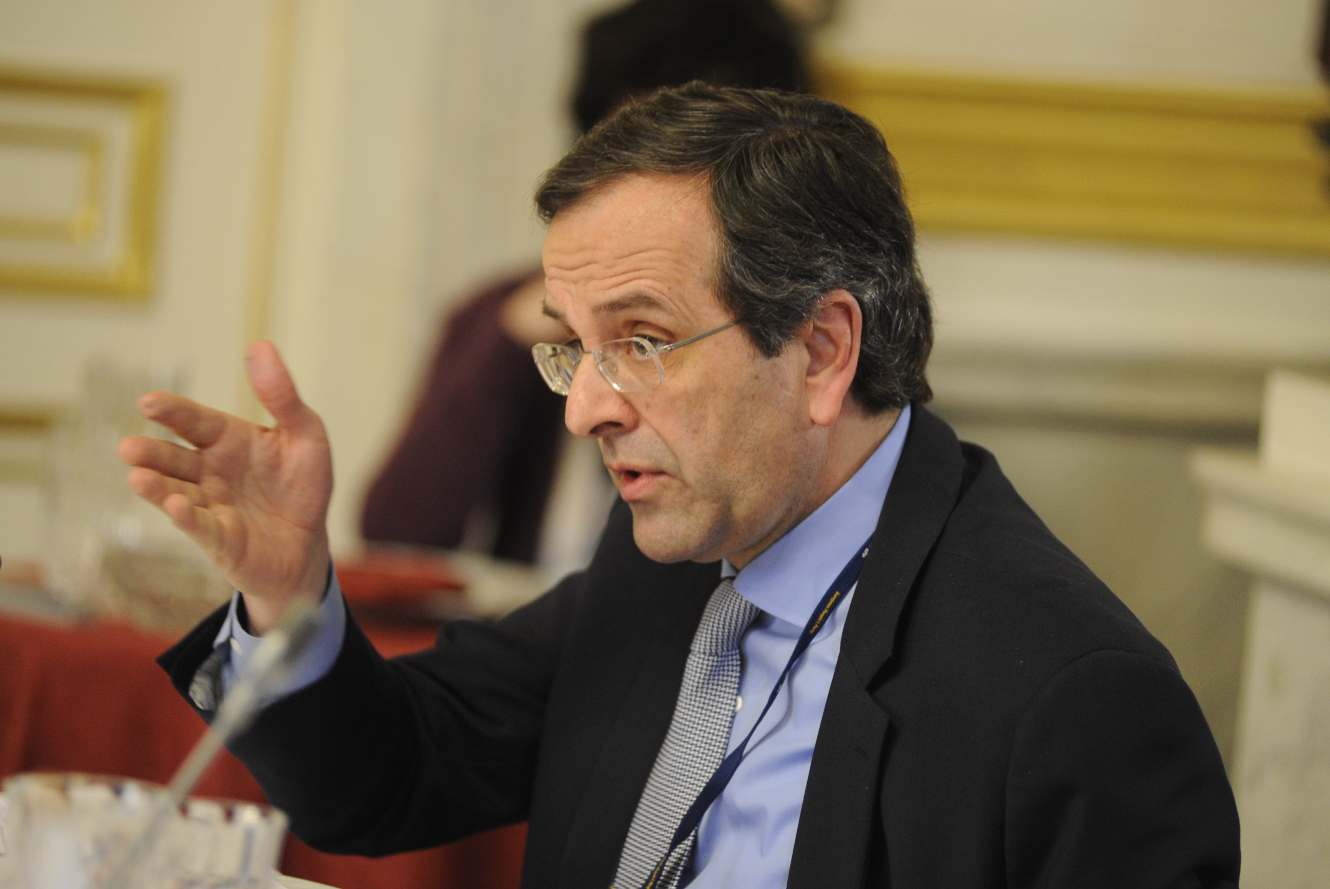 EPP Summit March 2010